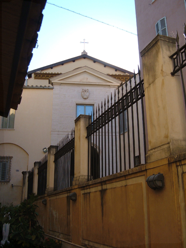 Chiesa dei Santi Michele e Magno, a Roma, nel rione Borgo. Foto personale.